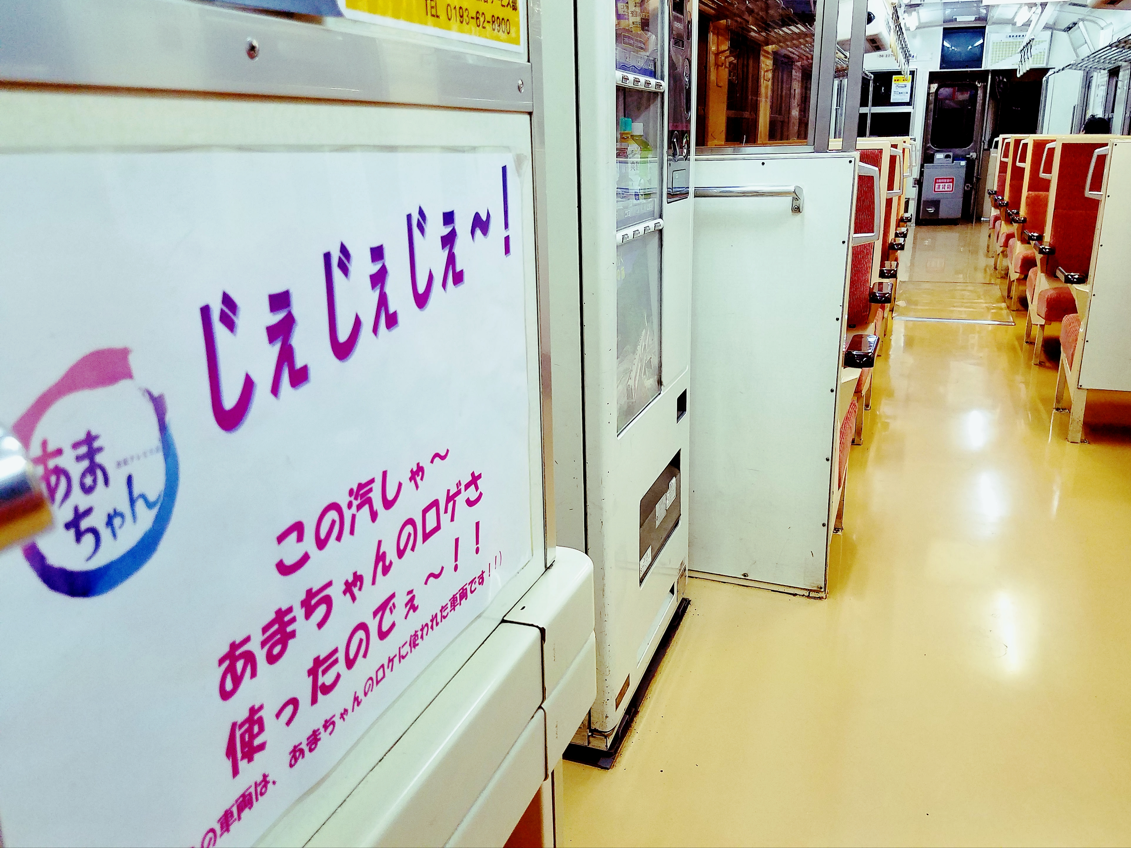 三陸鉄道 北リアス線